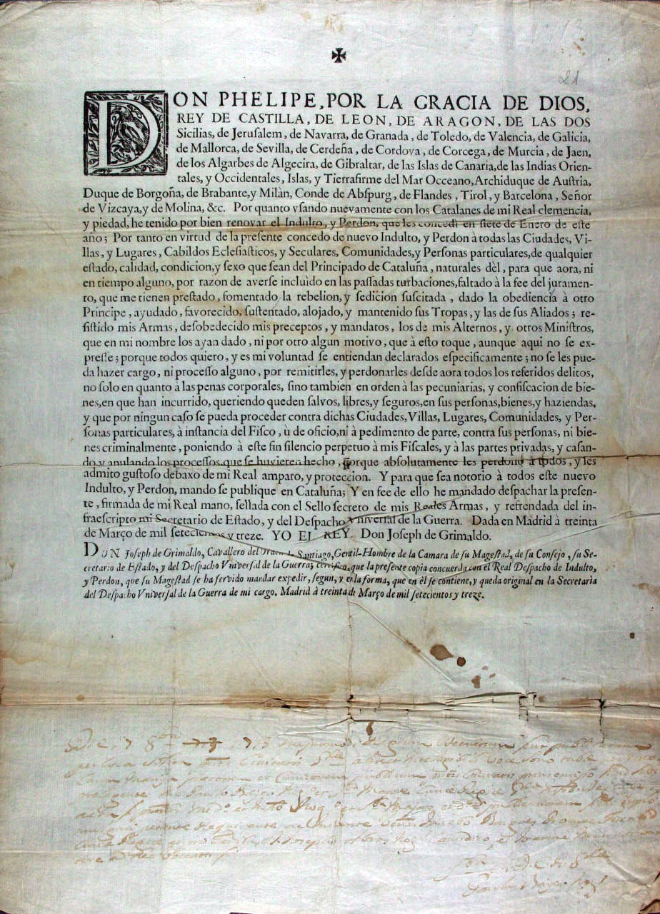 Perdon general de Felipe V a los catalanes 30 marzo 1713